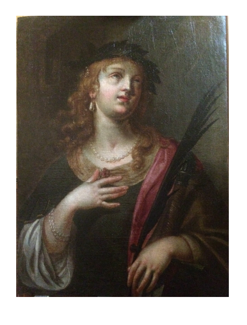 Olio su prima tela